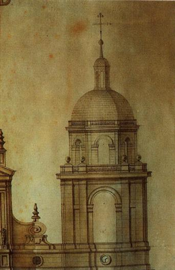 Plano de reforma de la catedral de Valladolid provista por dos torres.